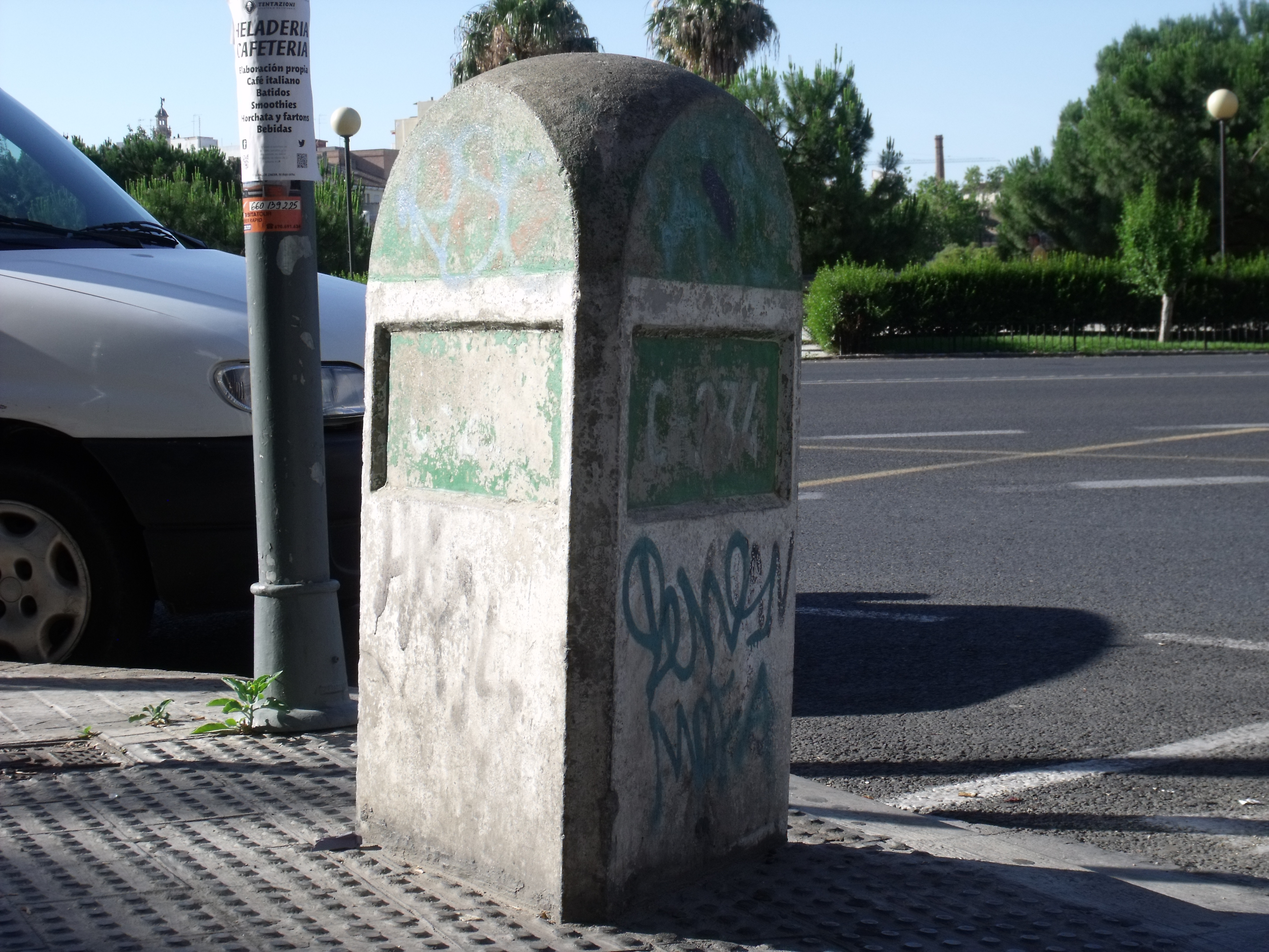 Mojón de KM 0 de la antigua C-234 al inicio de la Avenida de Burjasot. Se trata de un hito kilométrico del estándar establecido en 1939 con el llamado Plan Peña.